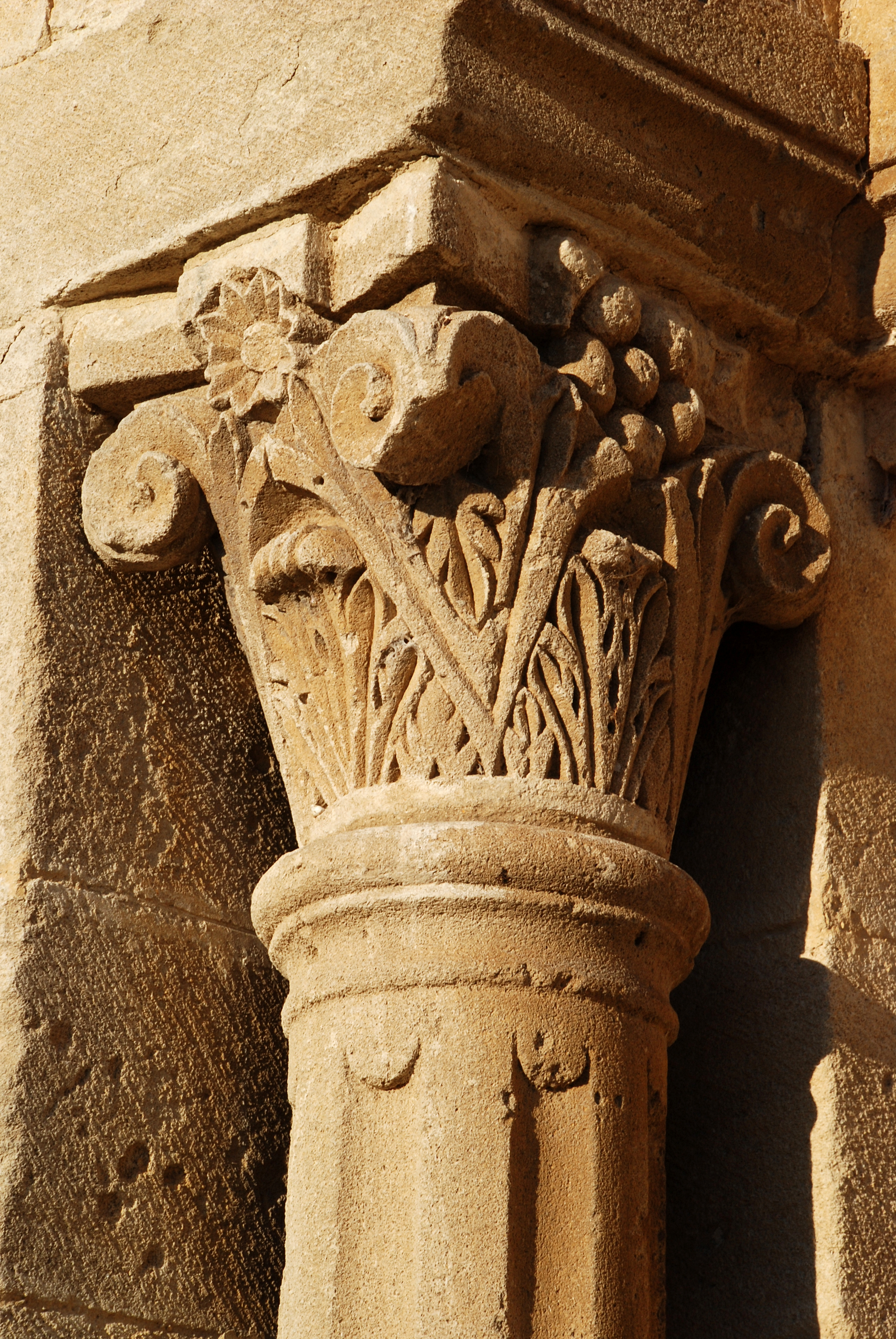 France - Provence - Prieuré Notre-Dame de Salagon